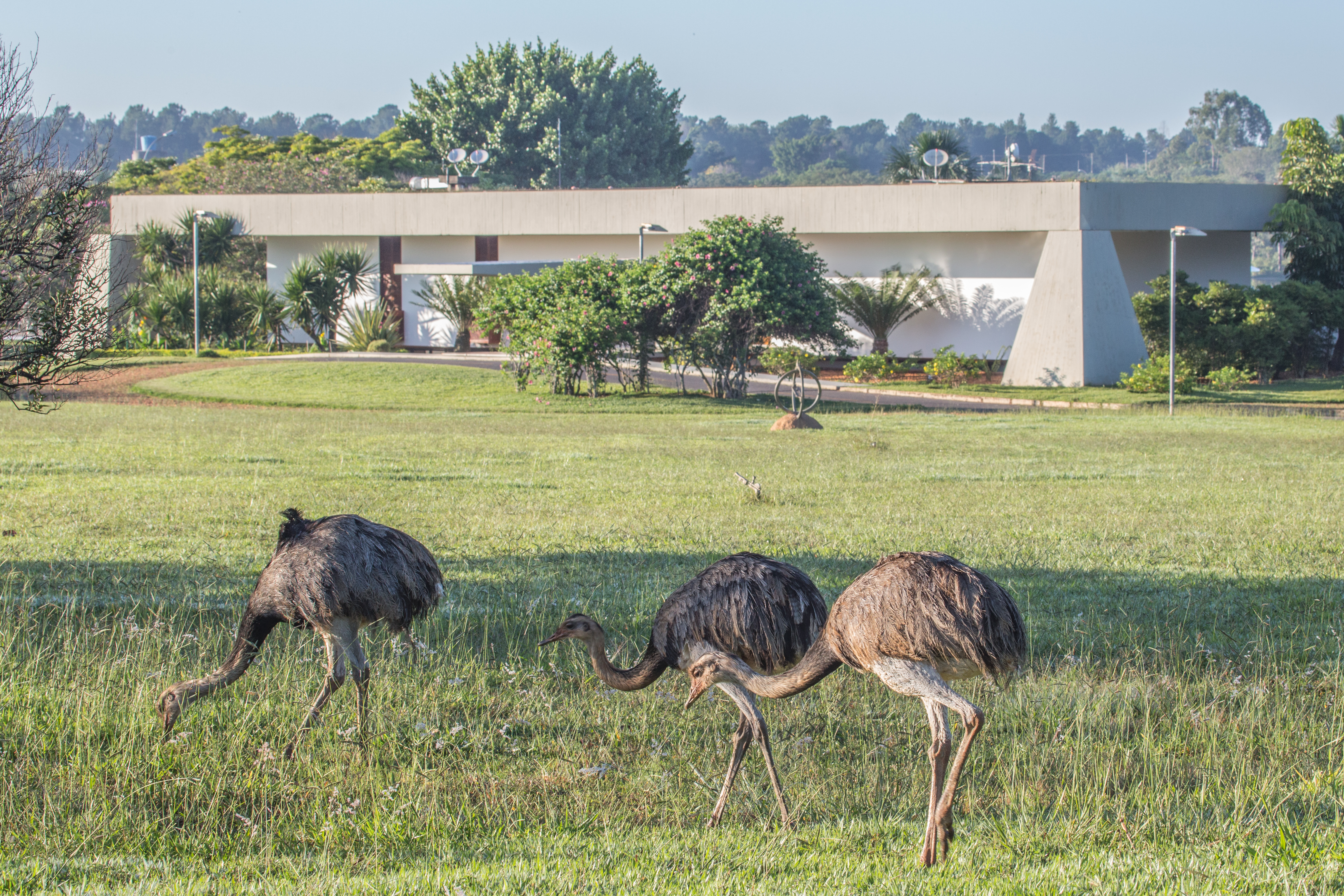 2014 - Palácio do Jaburu Fotos: Anderson Riedel